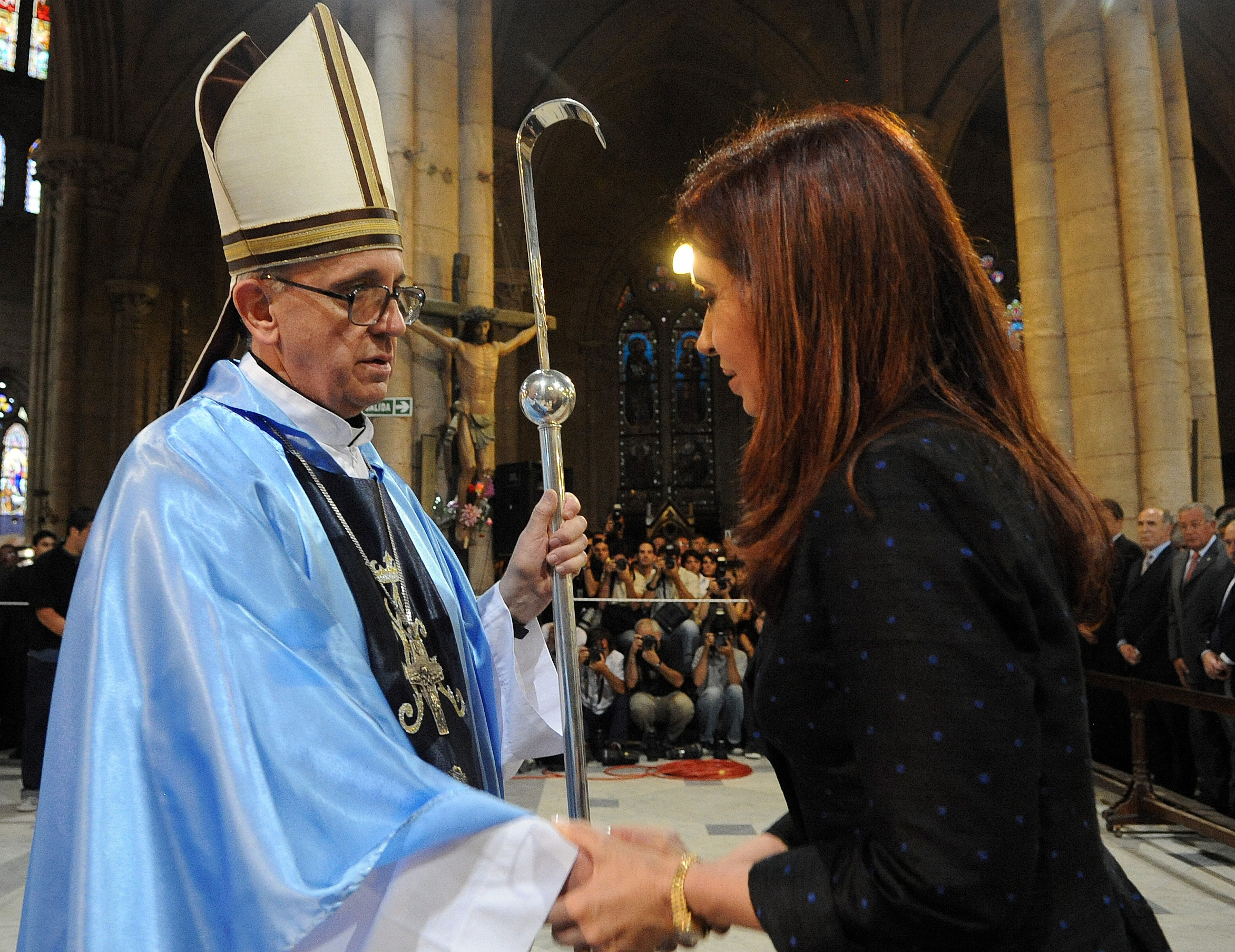 Misa en conmemoración de la mediación papal por el Beagle